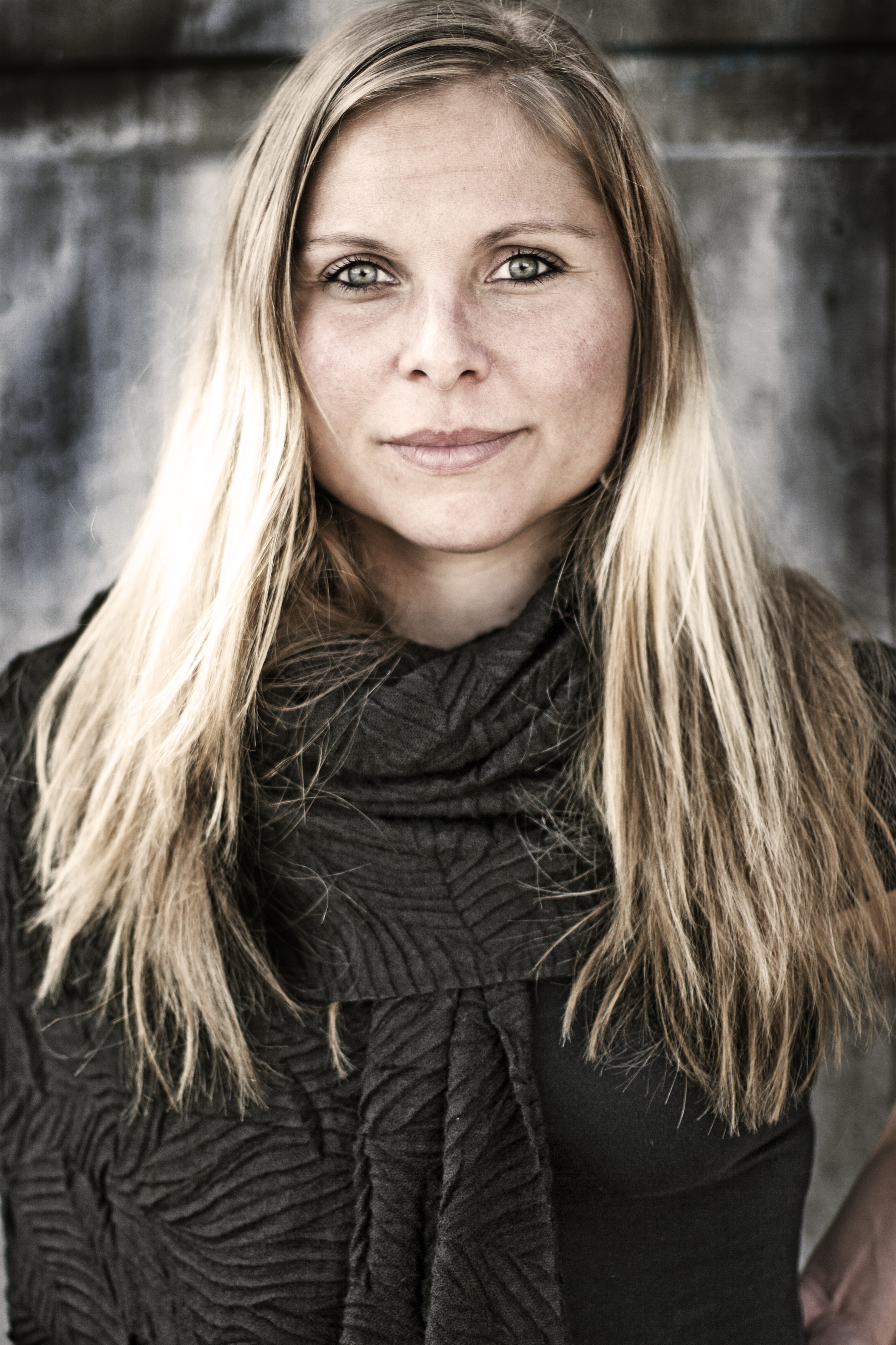 Författaren Elin Lindqvist.